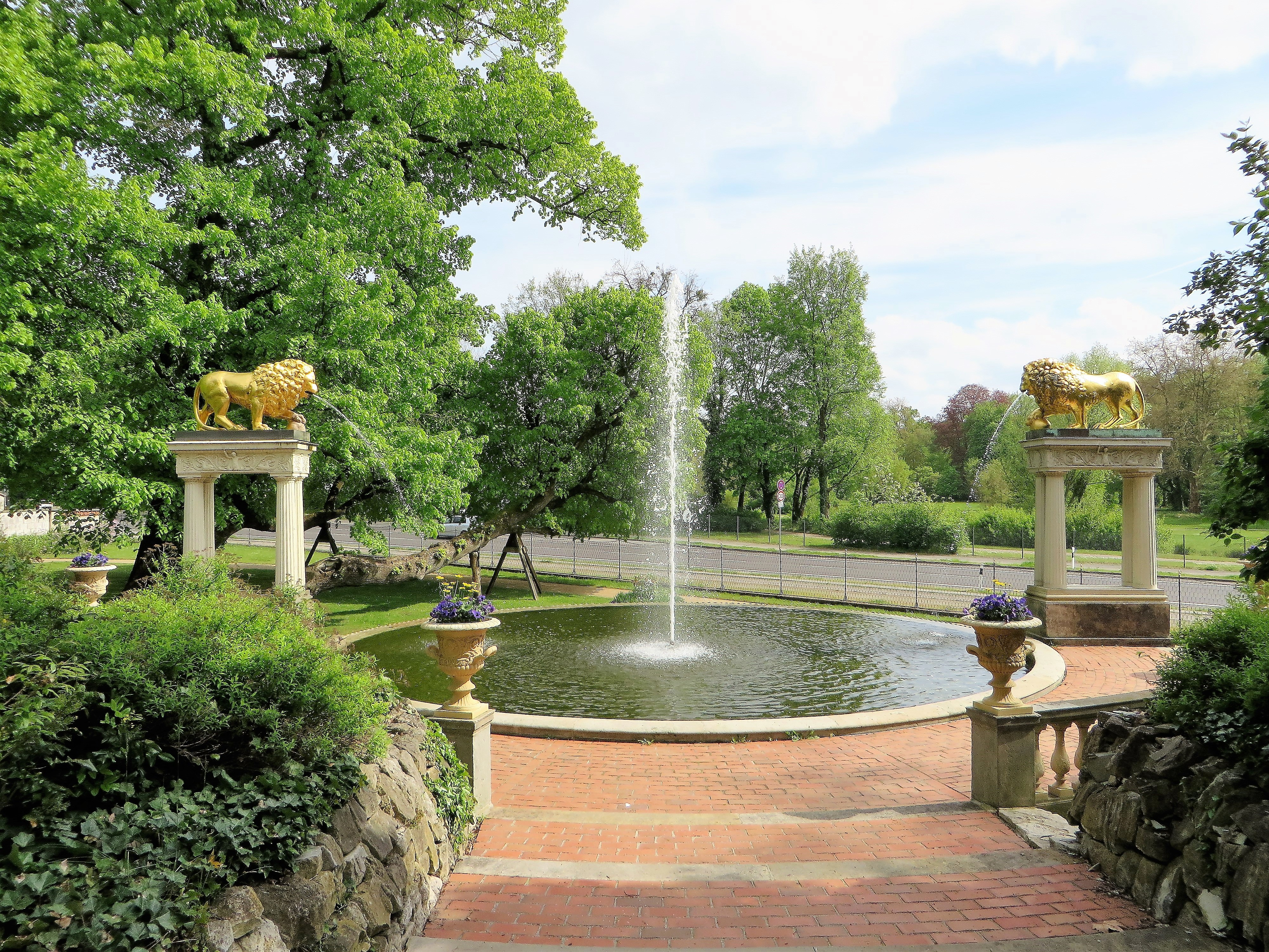 Park Schloss Glienicke Berlin. Blick auf den Löwenbrunnen mit Fontaine. Im Hintergrund die Königstraße.